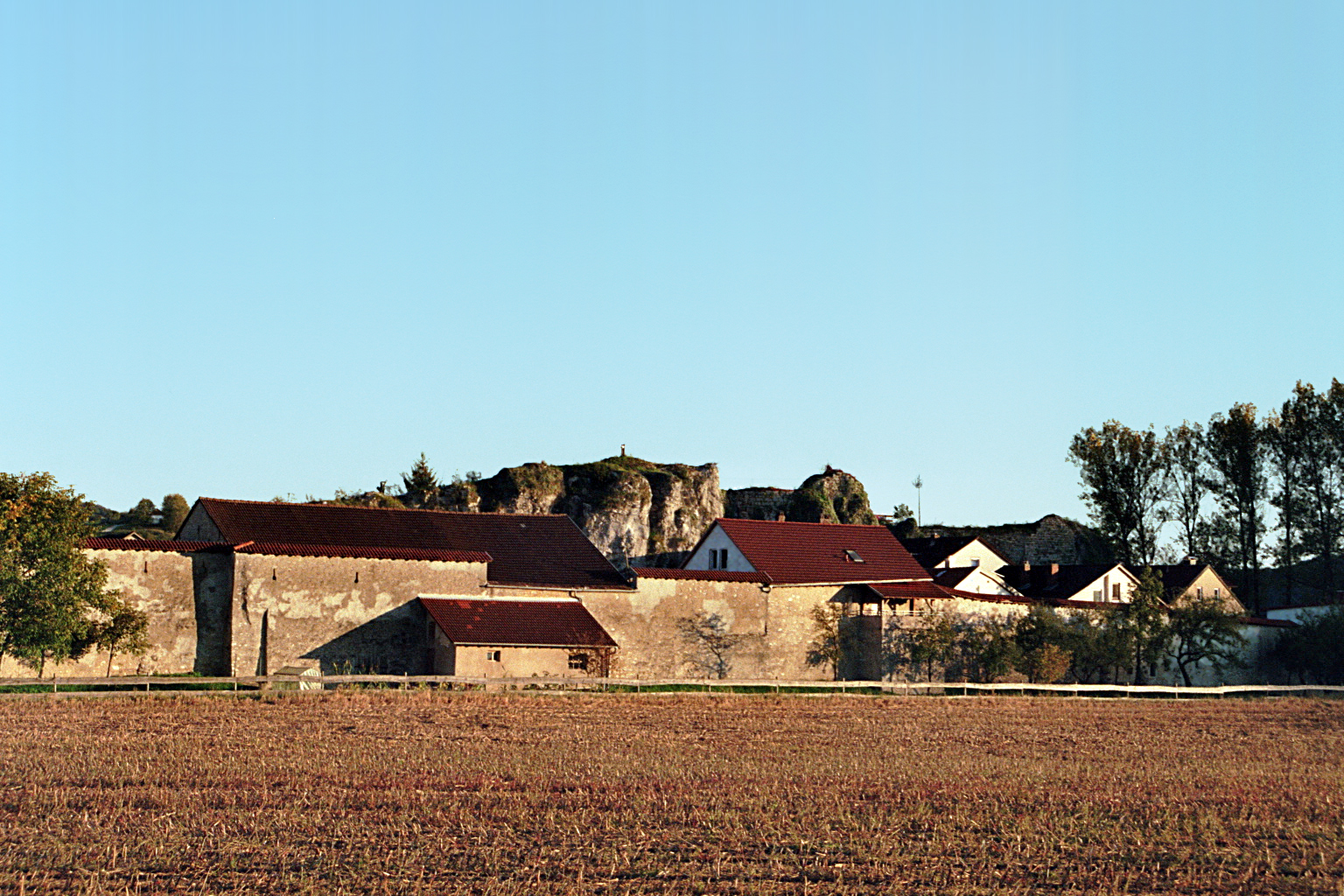 Dollnstein, Altmühltal, Bayern: Marktbefestigung mit Burgberg.